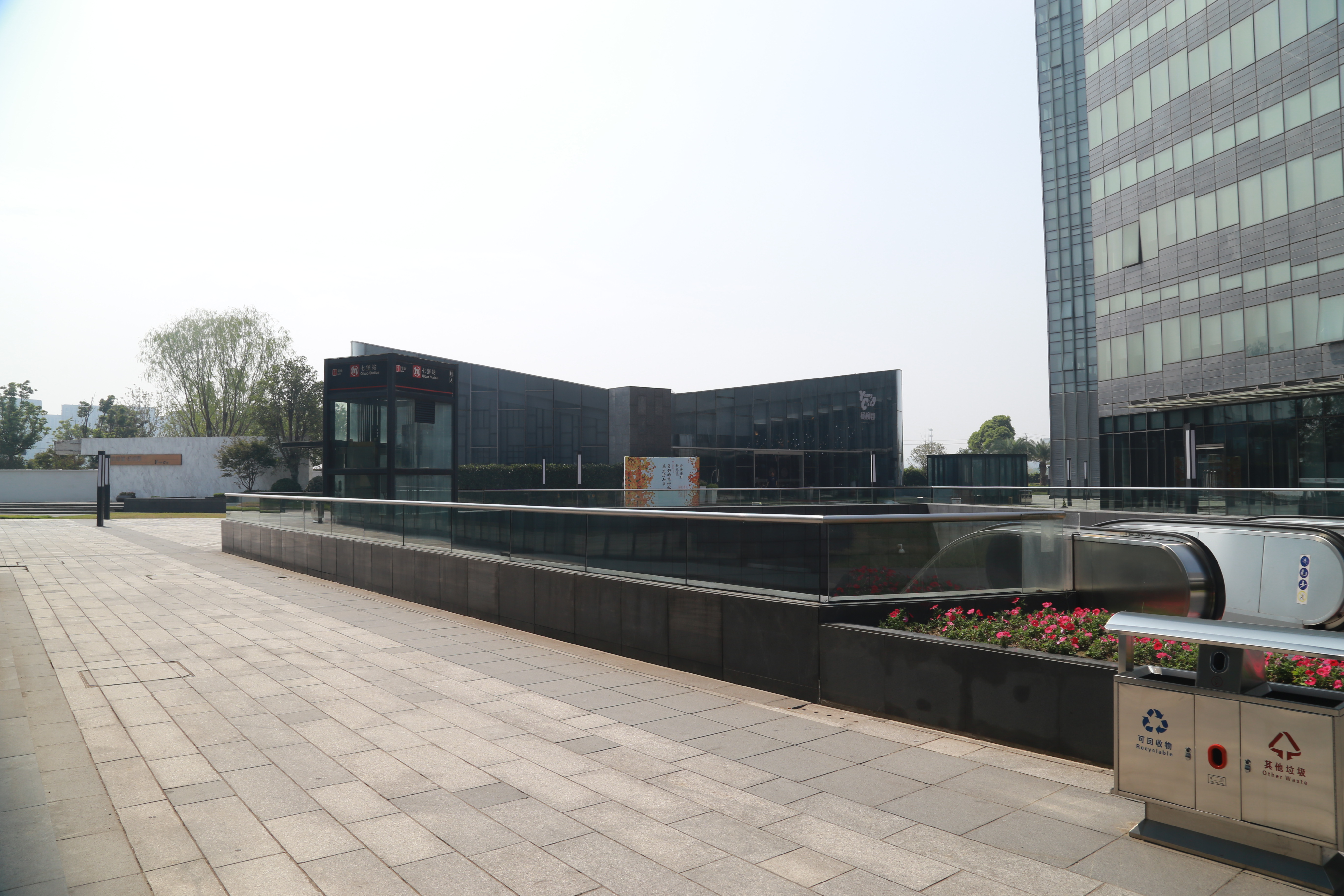 杭州地铁七堡站垂直电梯